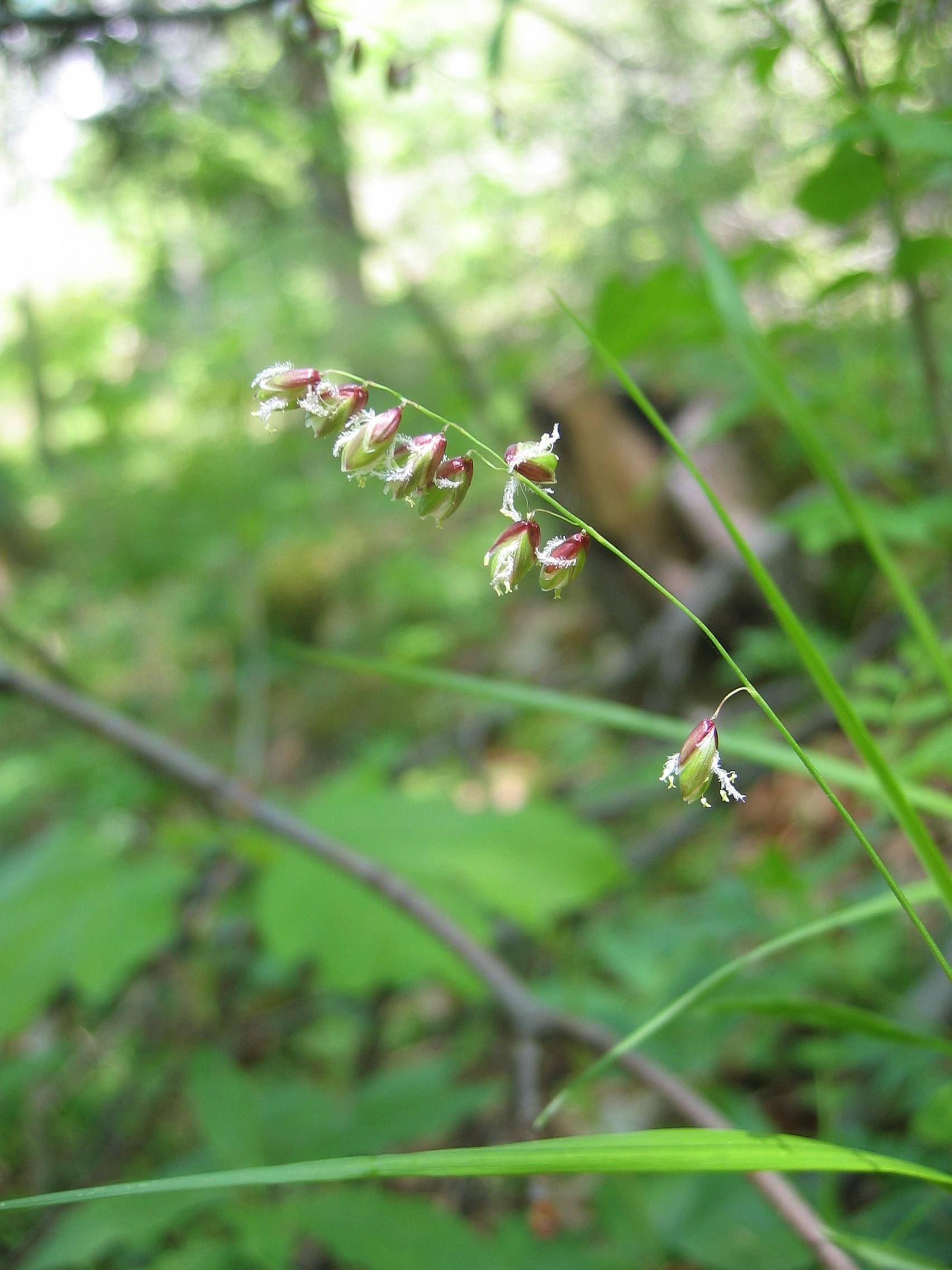 Melica nutans Kaltenbachwildnis, Upper Austria, Austria